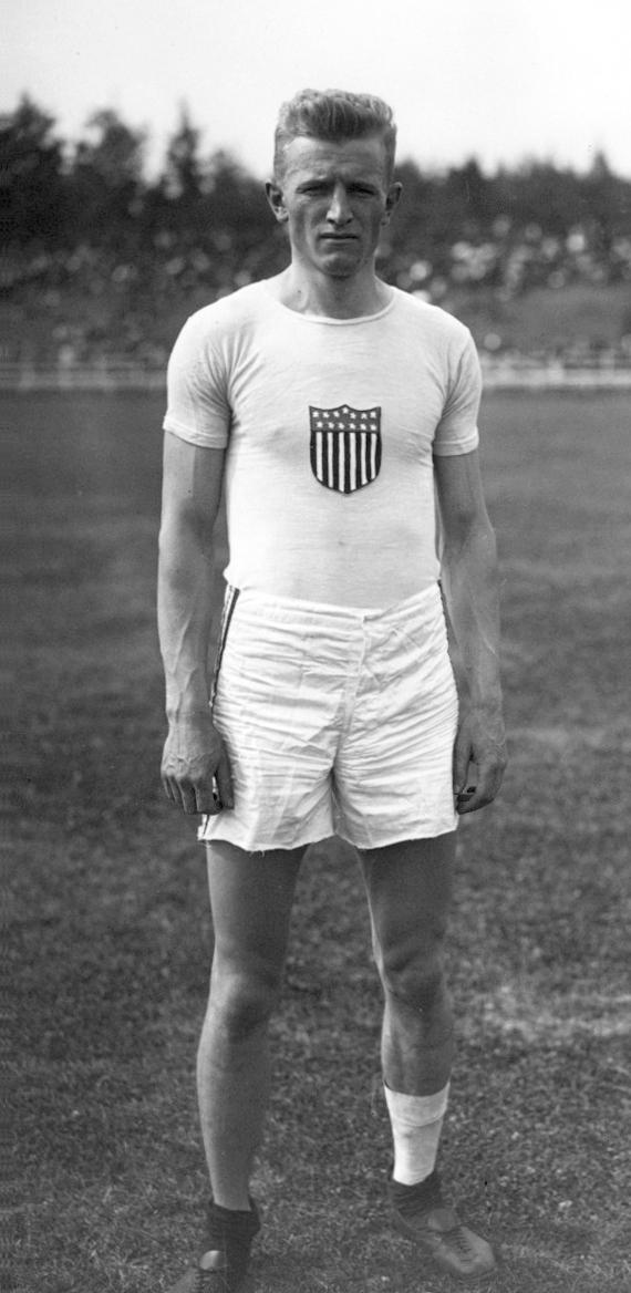 23-7-12, Reims, Martin Hawkins, américain, 110 mètres haies [portrait] : [photographie de presse] / [Agence Rol]